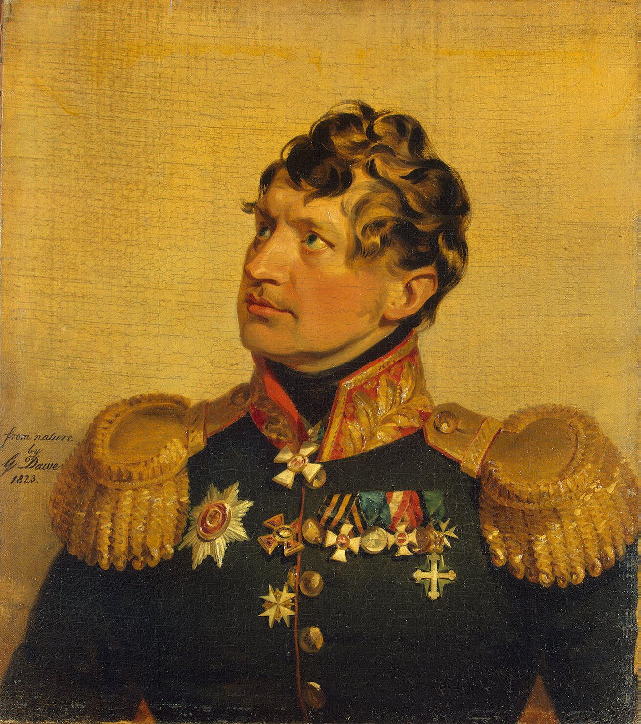 Alexander Vladimirovich Rozen 3-d (18.10.1779 – 20.08.1832) russian general